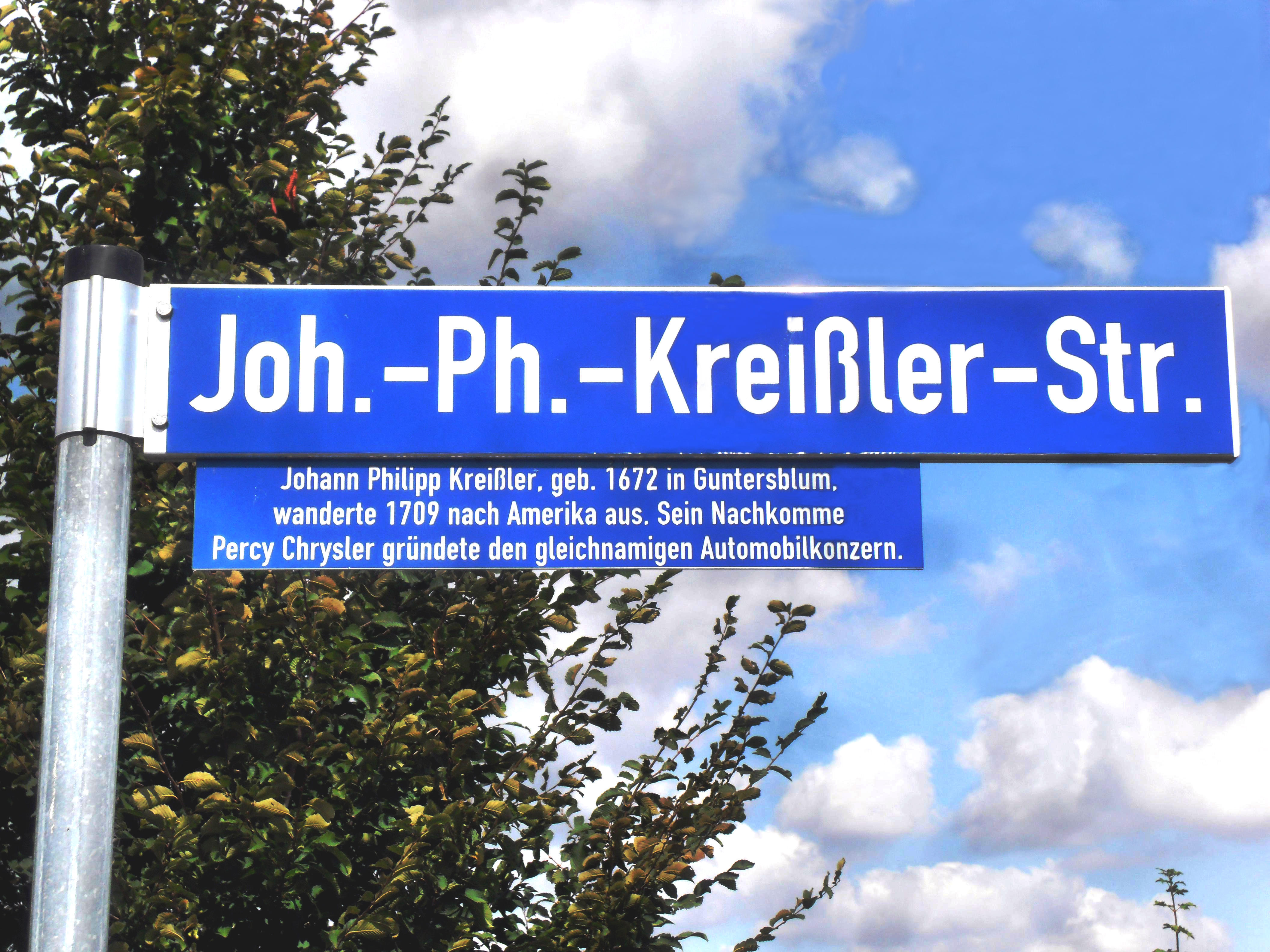 Straßenschild der Joh.-Ph.-Kreißler-Straße im rheinhessischen Guntersblum (Deutschland)